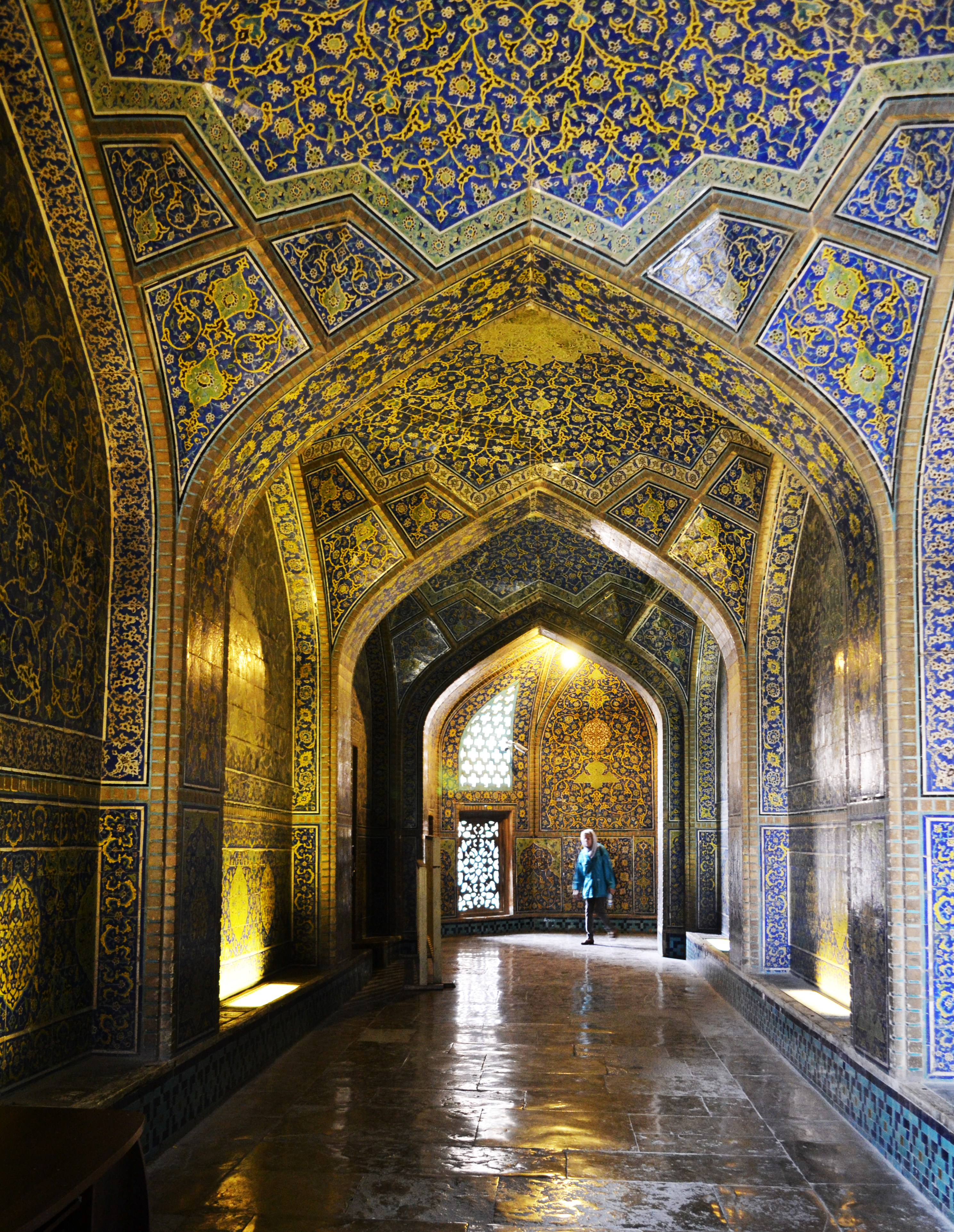 مسجد شیخ لطف الله